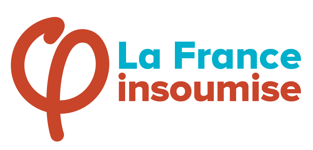 Logo de La France insoumise.